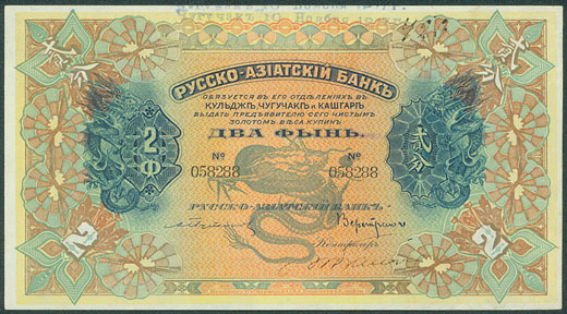 俄华道胜银行金币券2分背面